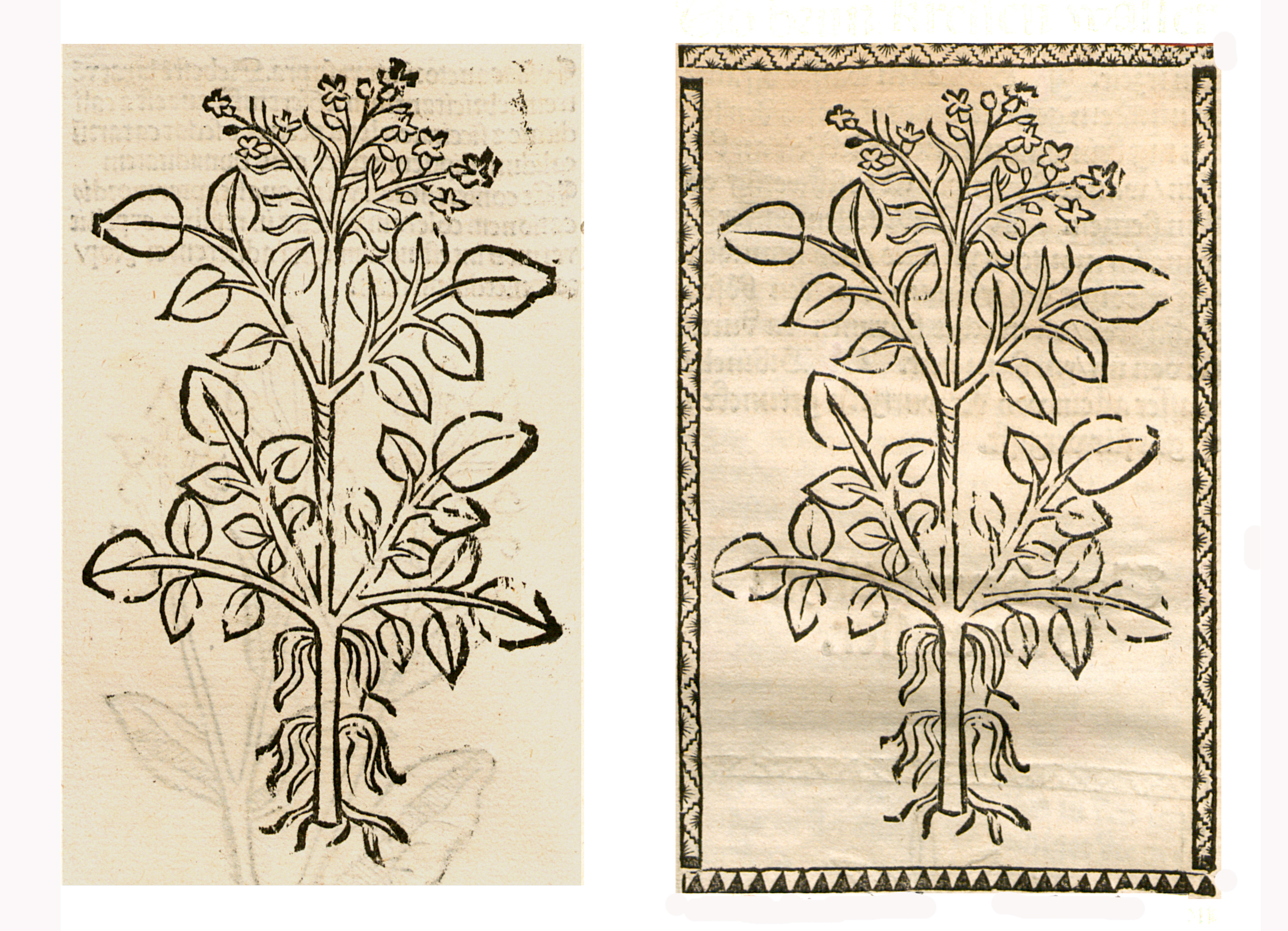 Abbildung von: Brunnenkresse